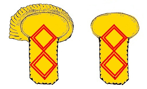 Spalline da Sottoluogotenente di 2^ classe dell'esercito napoleonico